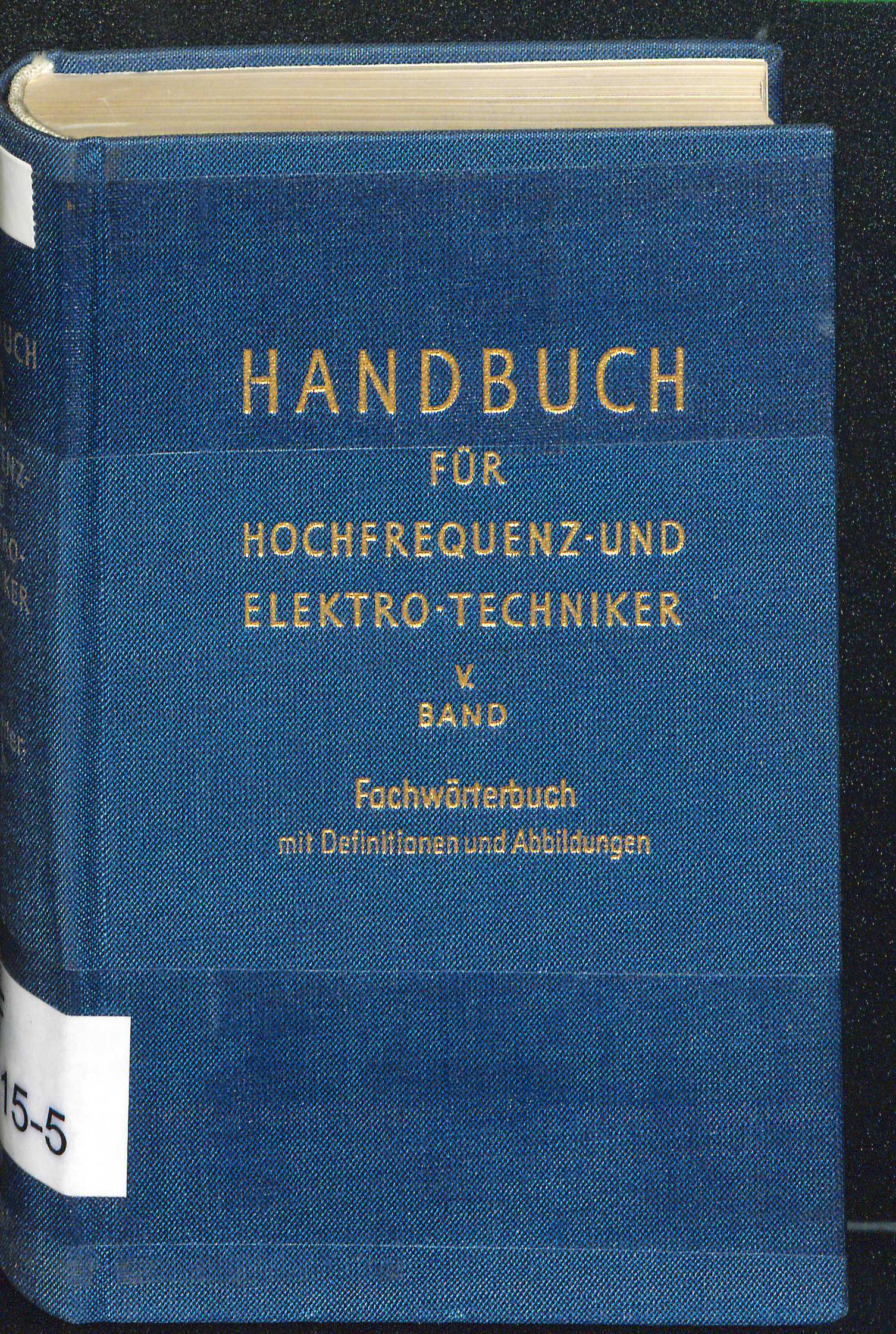 Handbuch für Hochfrequenz- und Elektro-Techniker V. Band. Fachwörterbuch. Berlin 1967 (1957) Curt Rint (Hrsg.): Lexikon der Hochfrequenz-, Nachrichten- und Elektrotechnik Band 5